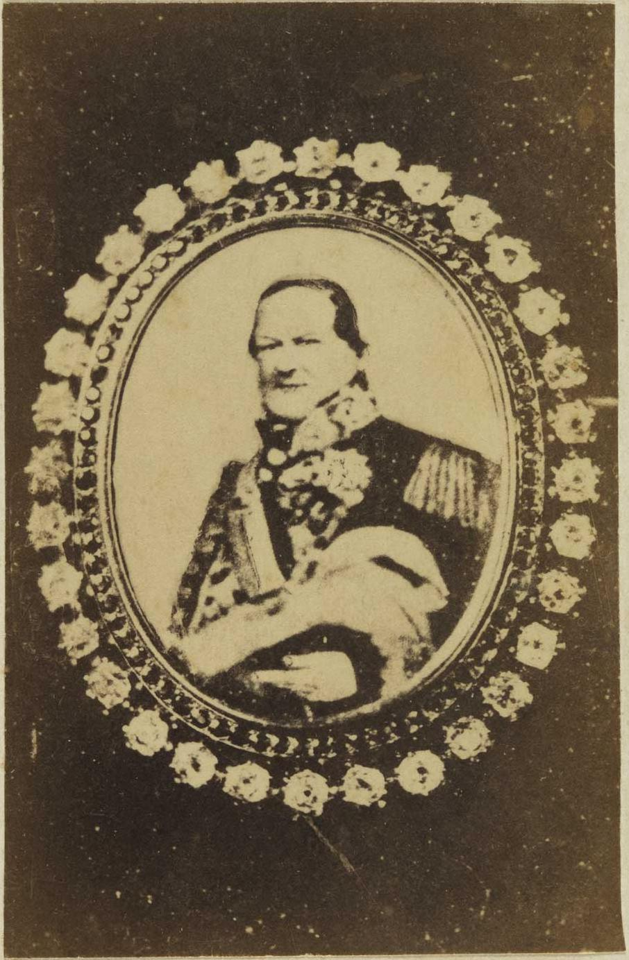 Carlos Antonio López.